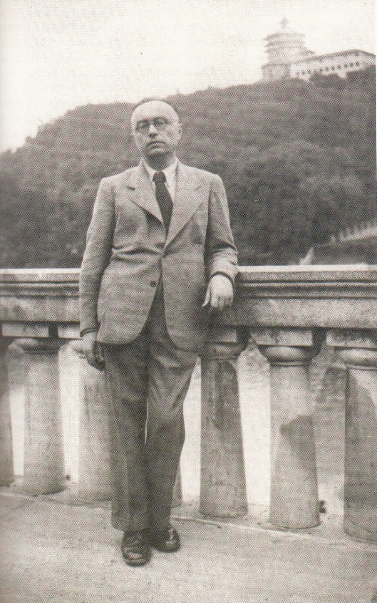 Giovanni Cavicchioli